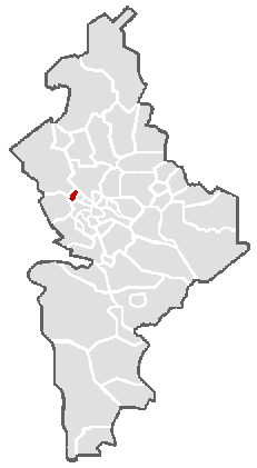 Ubicación geográfica del municipio de Hidalgo en el estado mexicano de Nuevo León.